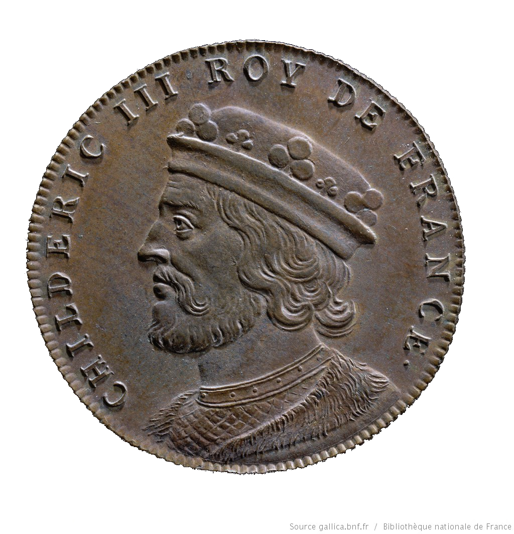 Jean Dassier (1676-1763) - Childéric III roy de France (754). Buste du roi à gauche ceint d'une couronne.